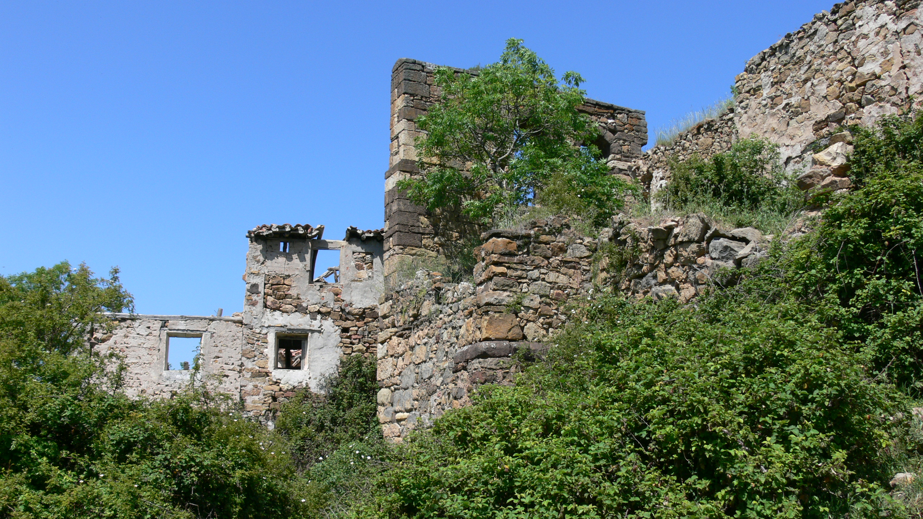 Ruinas de la iglesia de Nuestra Señora de la Esclavitud en Villanueva de San Prudencio, despoblado de Lagunilla del Jubera (La Rioja - España).